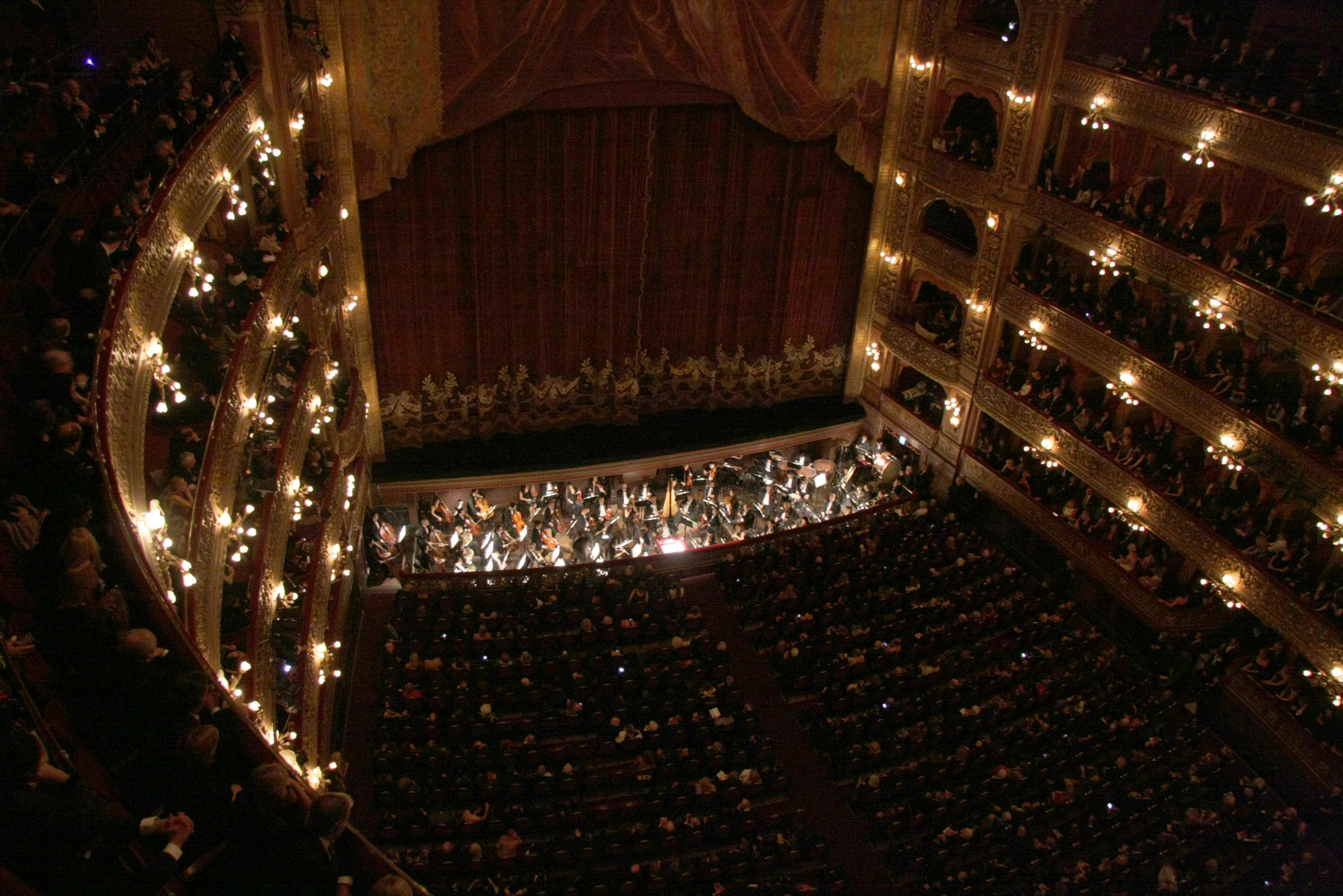 Gala de reapertura del Teatro Colón. Vista de la orquesta antes del comienzo de La Boheme.